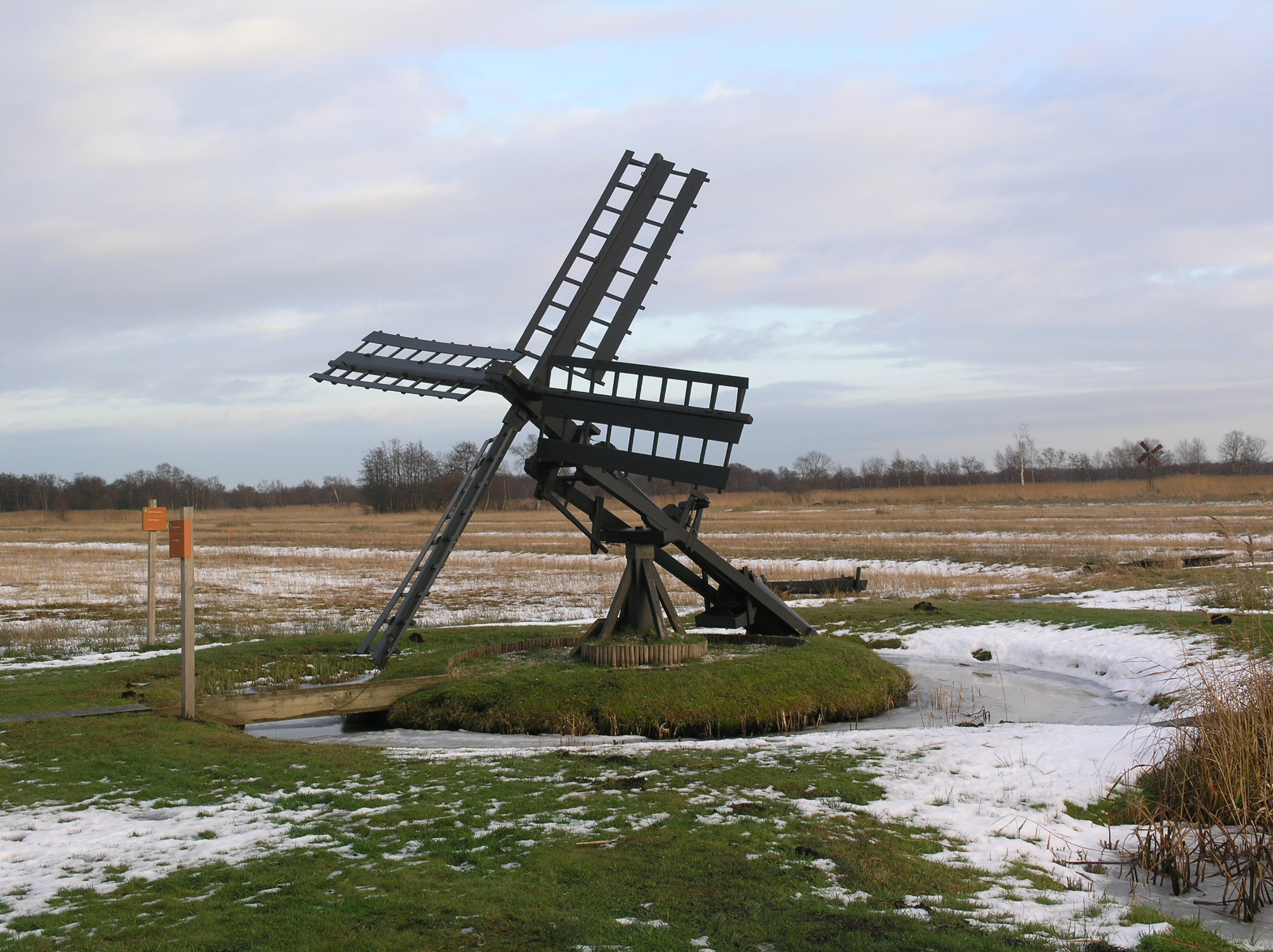 Kalenberg Tjasker